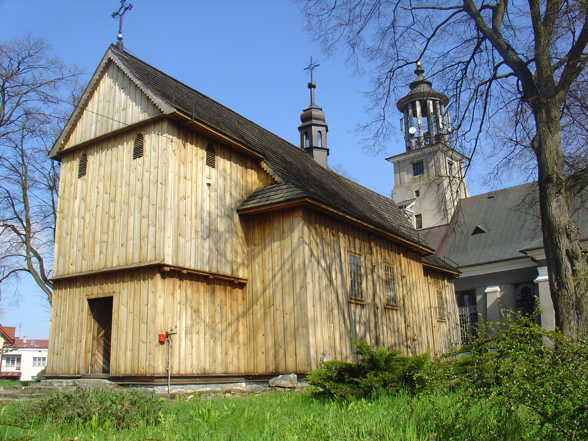 Annopol, ul. Kościuszki 2 - kościół parafialny p.w. śś. Joachima i Anny (drewn., XVIII w.)Cmentarz kościelnyzabytek nr A/99 z 30.11.1966 i z 24.02.1977